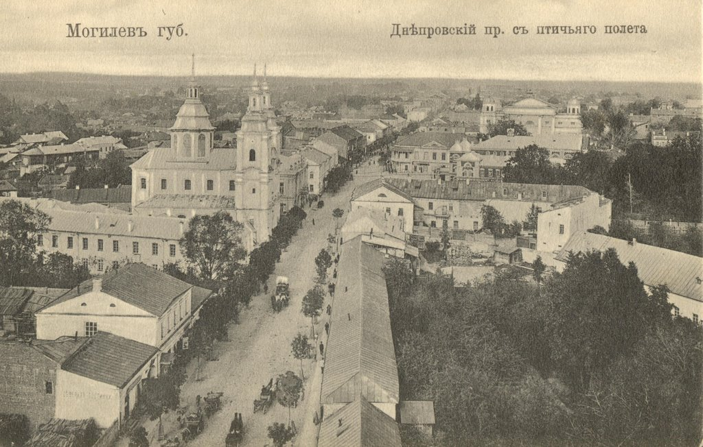 Беларуская (тарашкевіца): Магілёў (Mahiloŭ), вуліца Шклоўская (vulica Škłoŭskaja) у бок пляцу Тэатральнага (plac Teatralny). Касьцёл Сьвятога Францішка Ксавэрыя і Анёлаў-Ахоўнікаў і калегіюм езуітаў